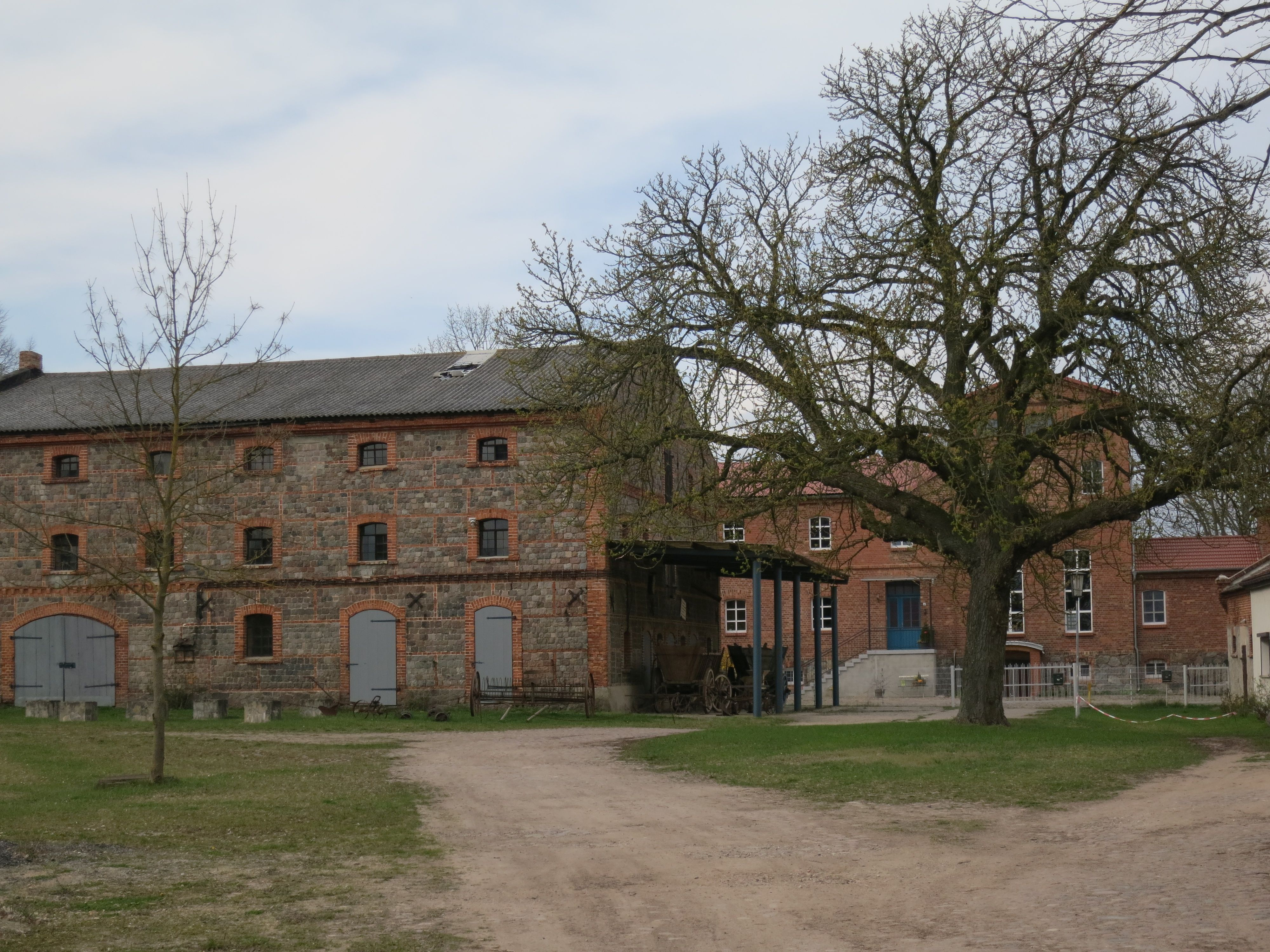 Strehlow, Gemeinde Oberuckersee, Wirtschaftshof des Gutes mit denkmalgeschütztem Arbeiterwohnhaus (links)